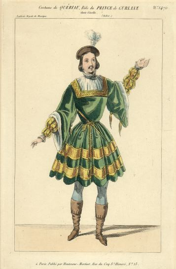 Germain Quériau (c. 1830)